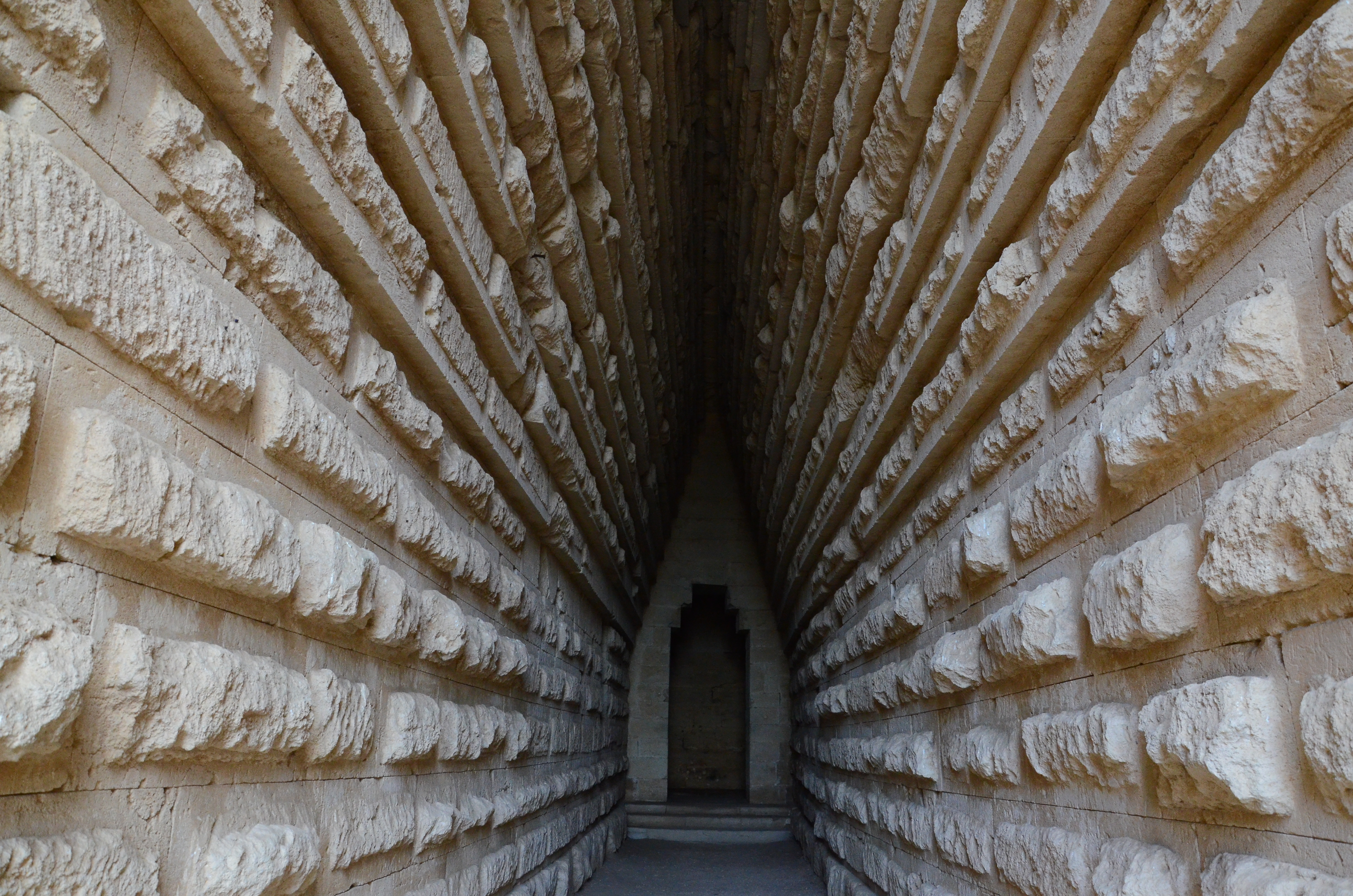 Царский курган